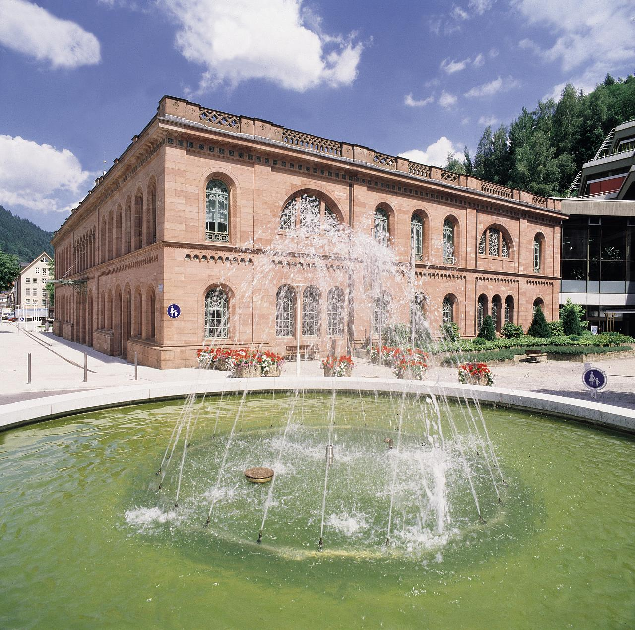 Aussenansicht Palais Thermal